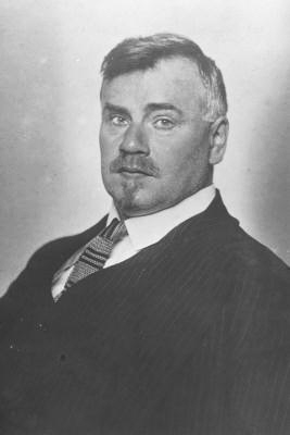 Leopold Bauer (1872 - 1938), Rakouský a slezský architekt.